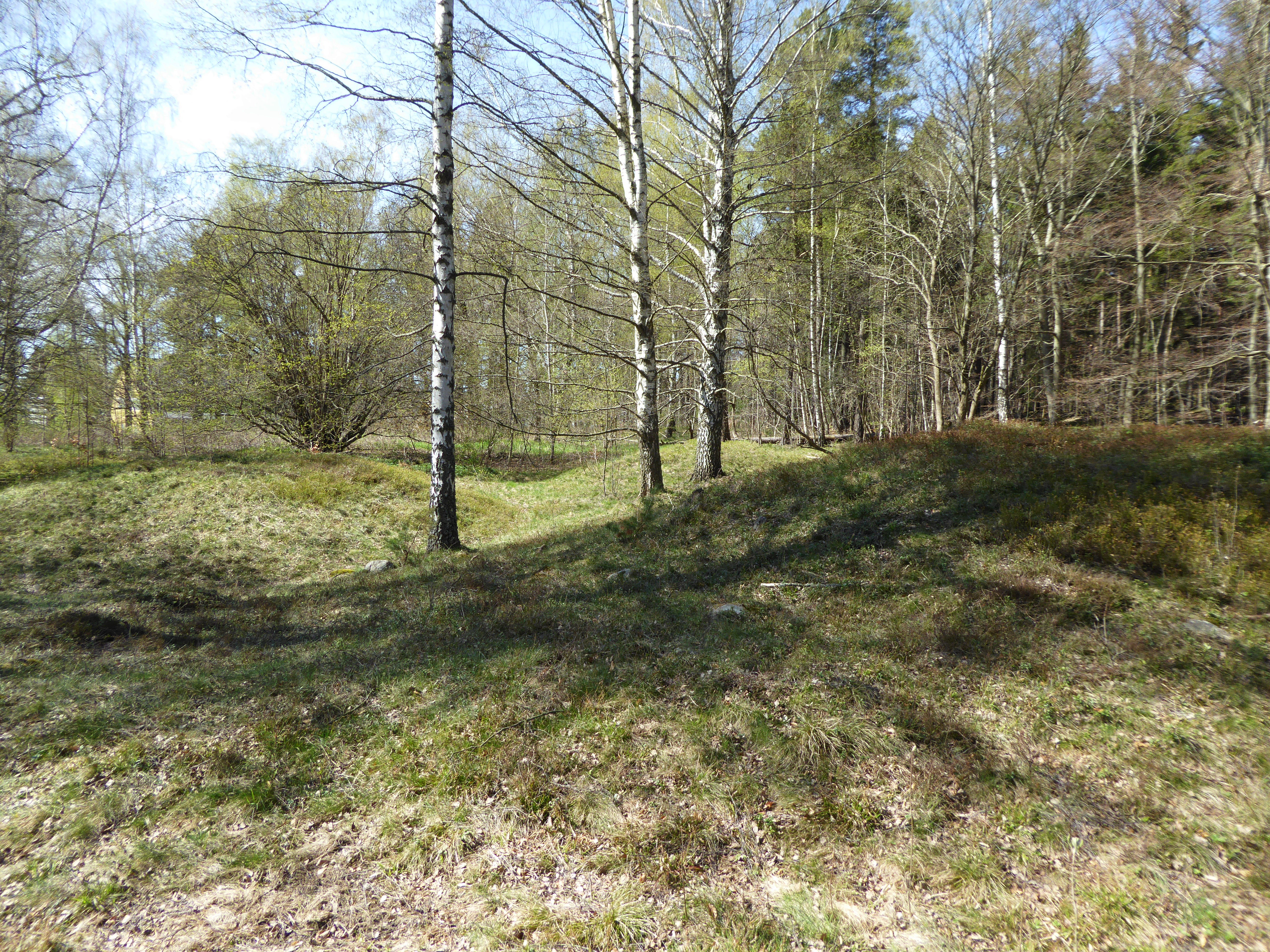 Mellanjärvsgravfältet, RAÄ-nummer Solna 18:1